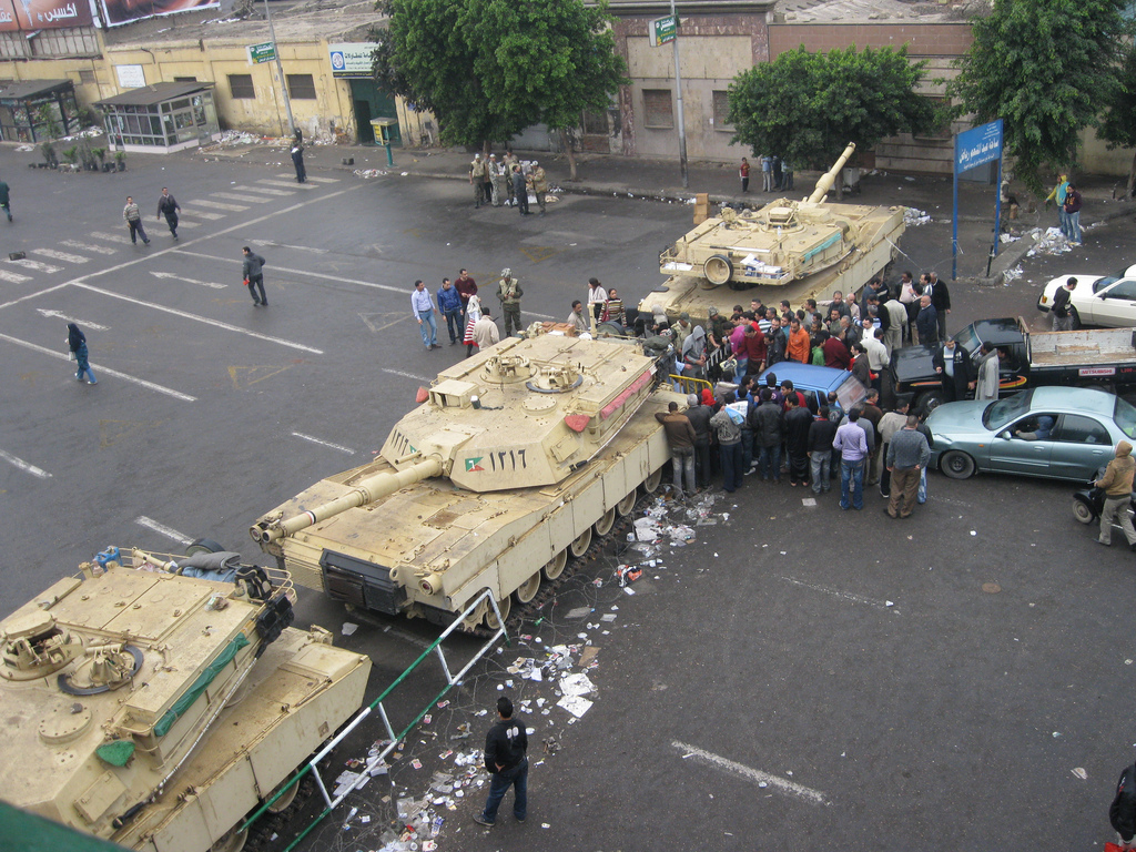 just outside midtown Tahrir area